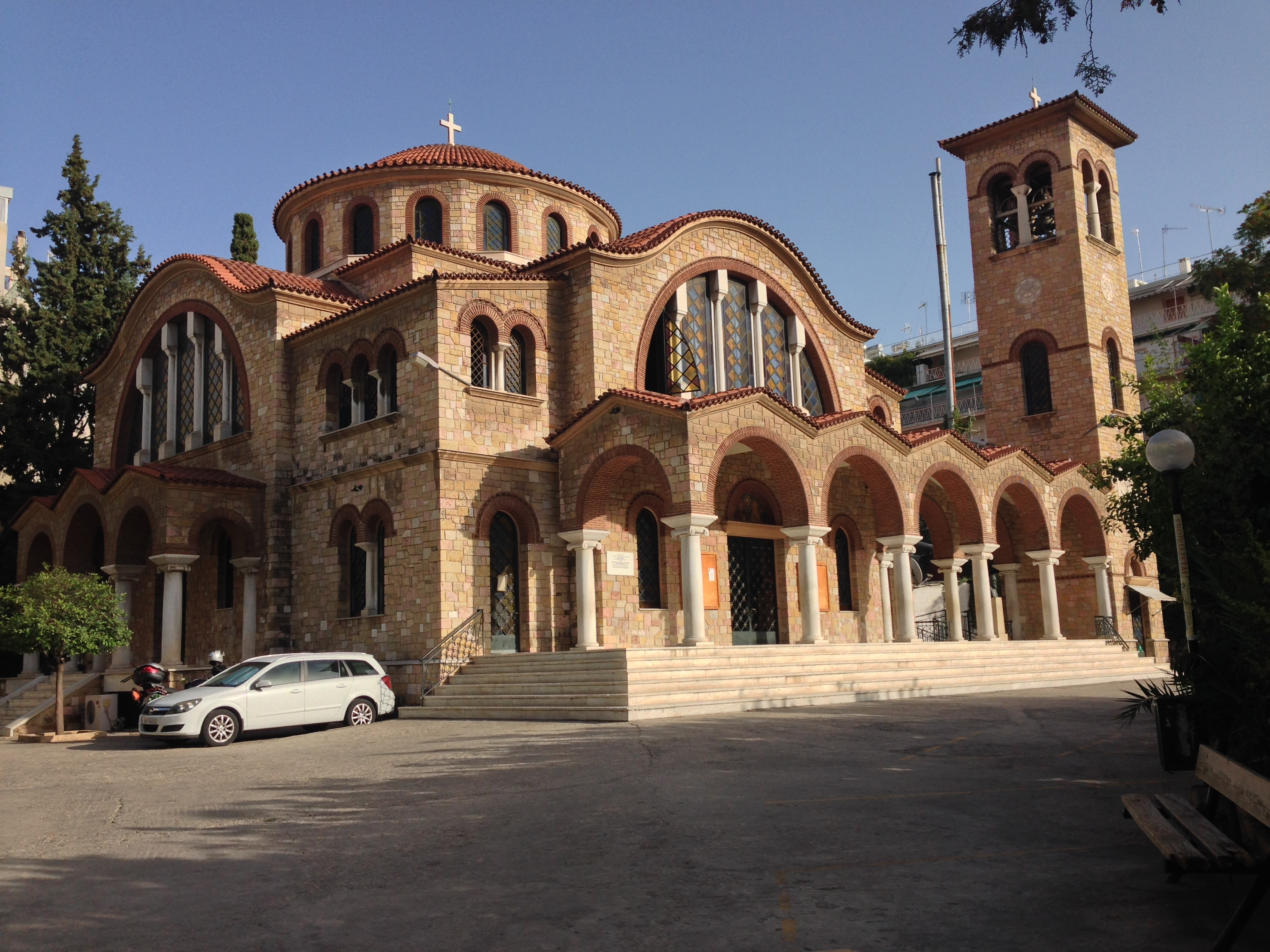 Ελληνόρυθμος Ναός Αγίας Τριάδας, Αχαρνών